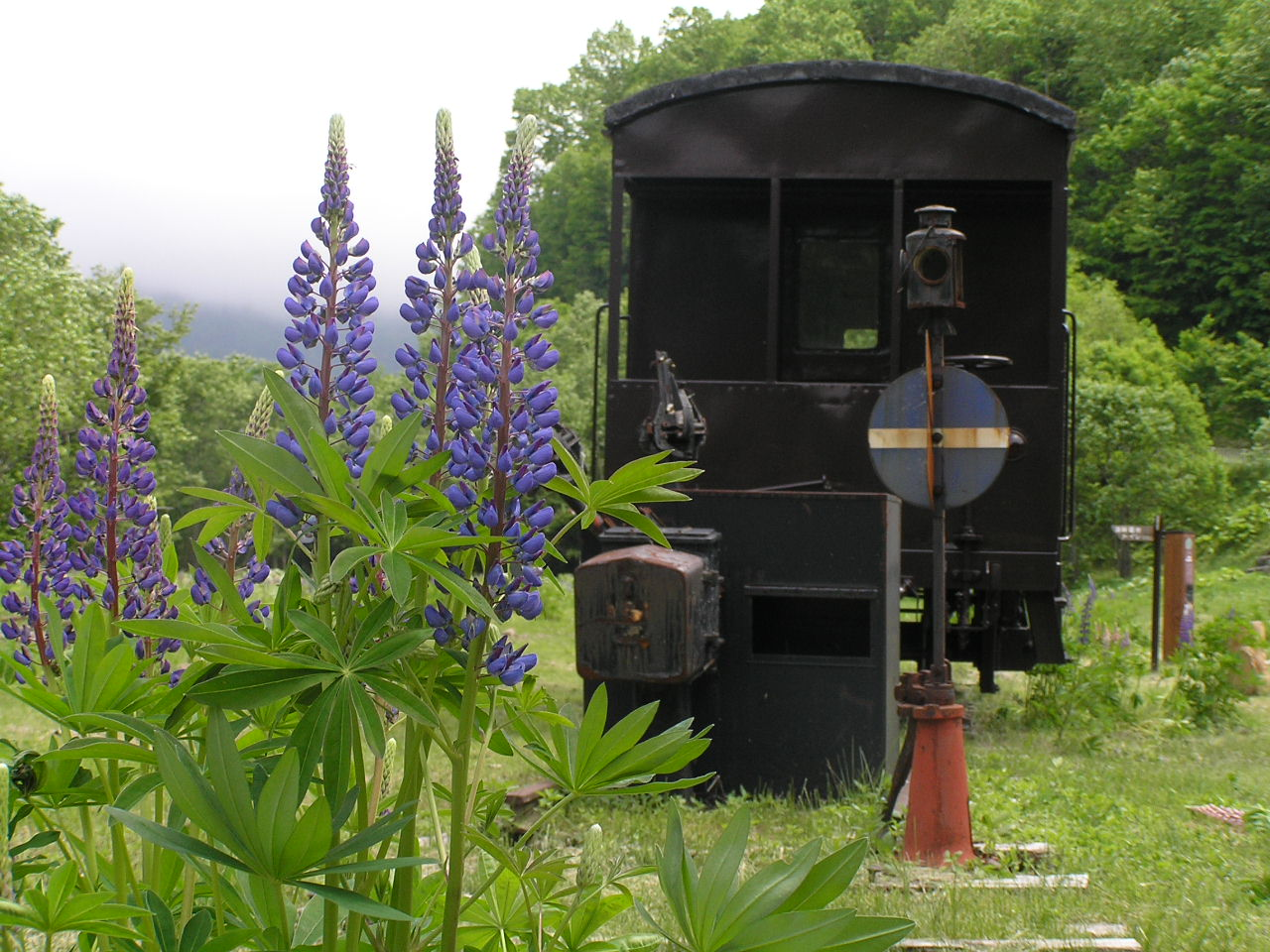 上士幌鉄道記念館